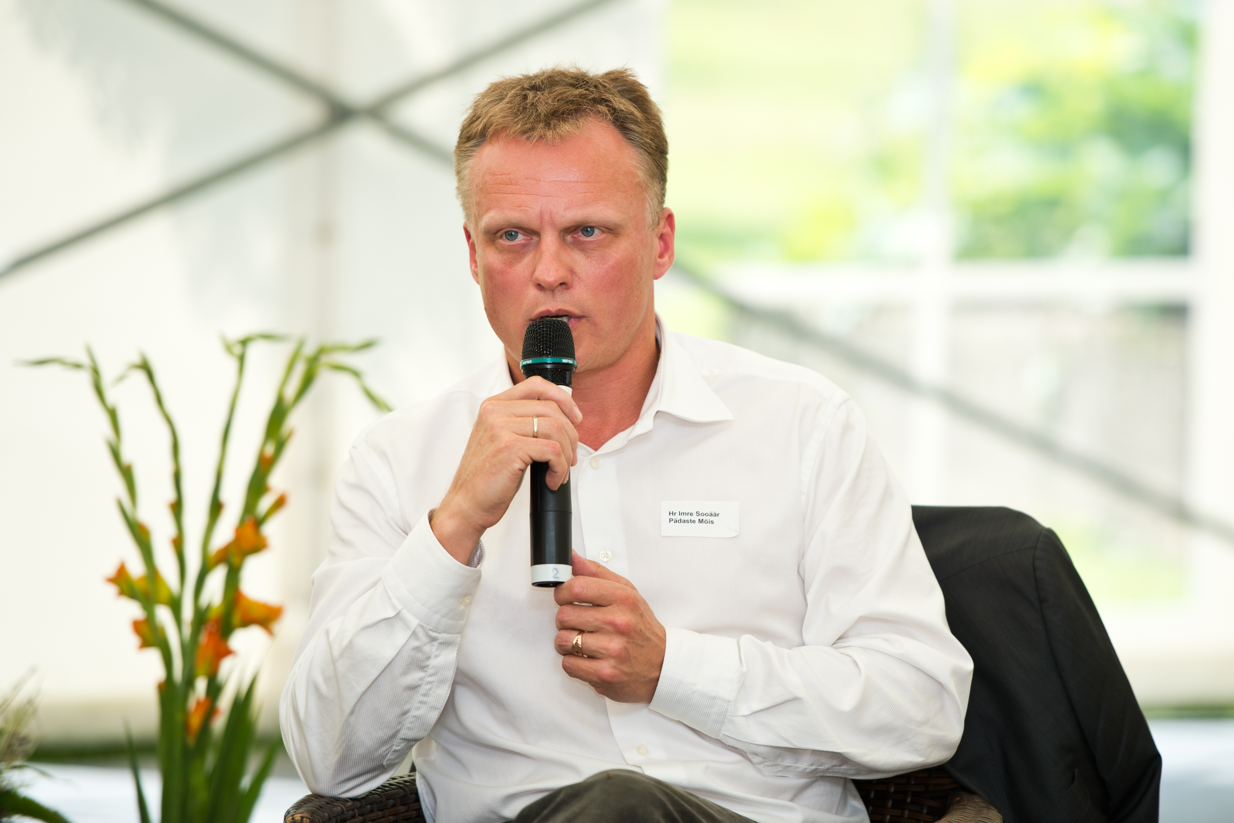 Ärmal Eesti toidu vestlusringis osalenud Riigikogu liige, OÜ Pädaste esindaja Imre Sooäär.